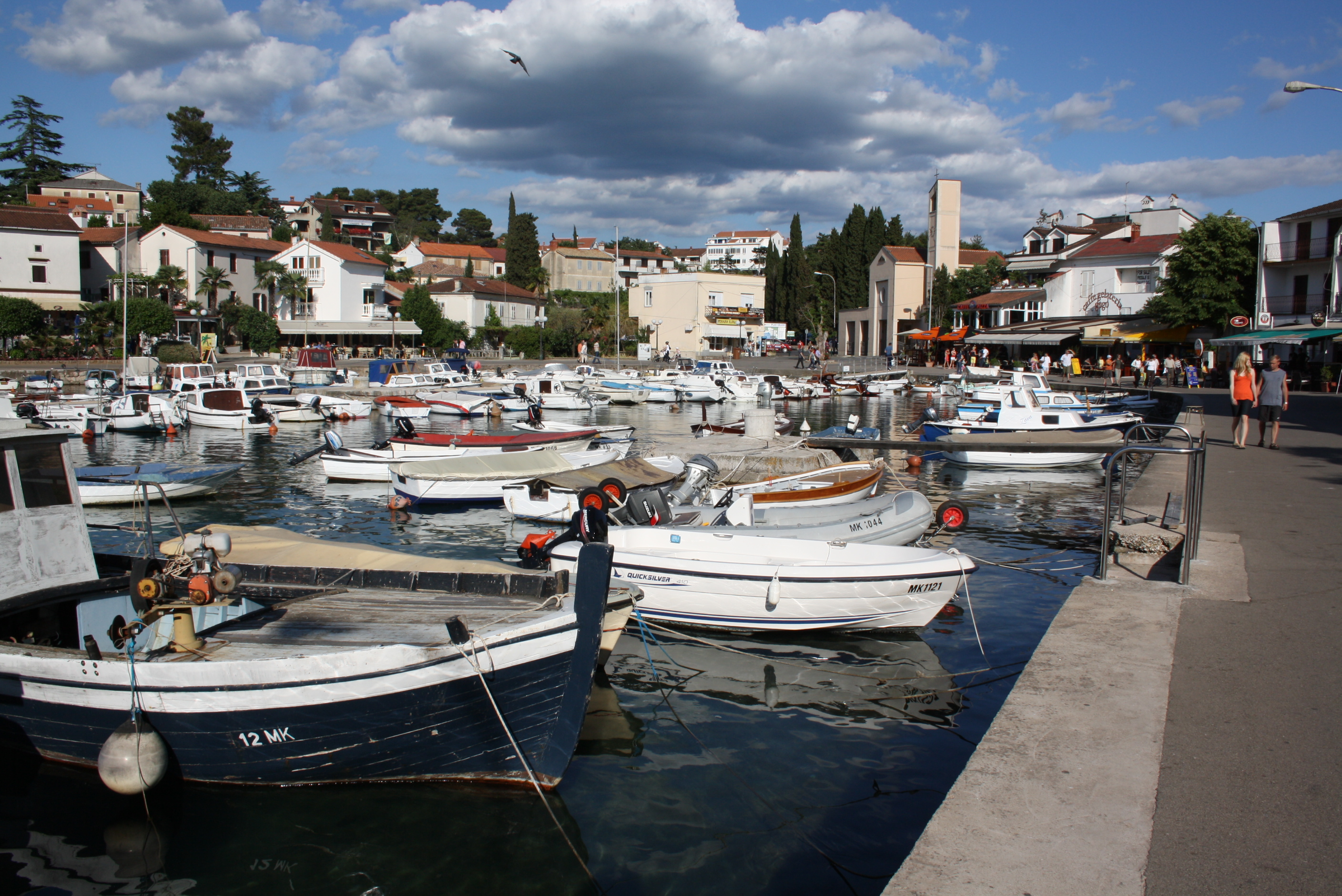 Hafen von Malinska - Kroatien